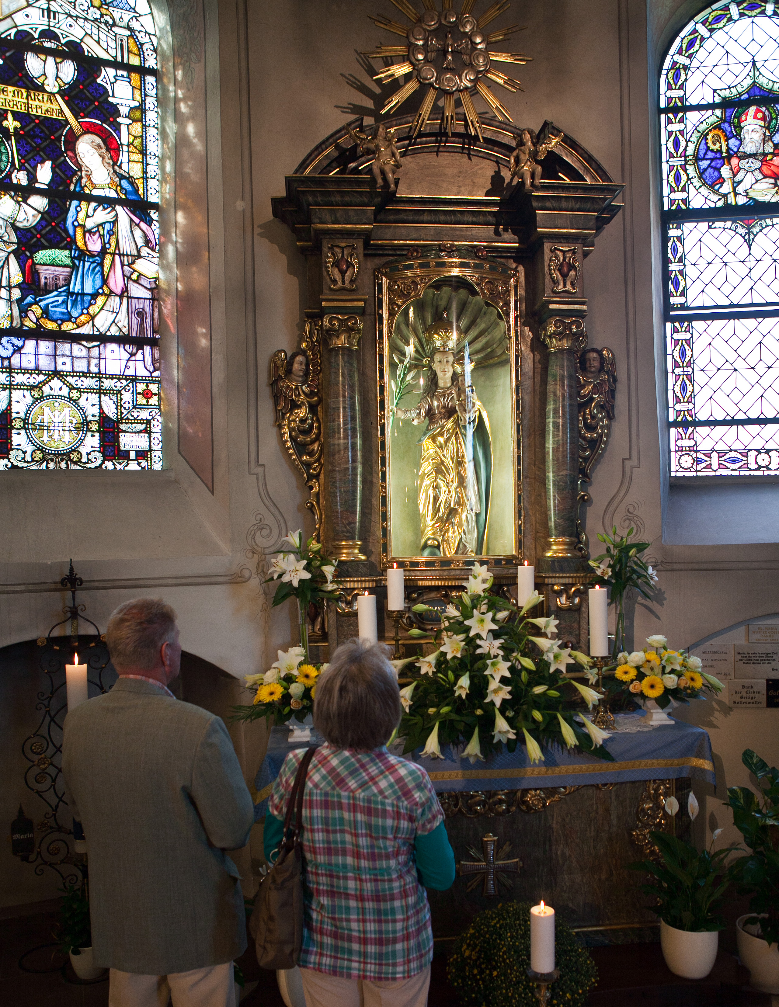 Muttergottesstatue unserer Lieben Frau mit der Lilie, Königin des Friedens, in der Wallfahrtskirche Barweiler.